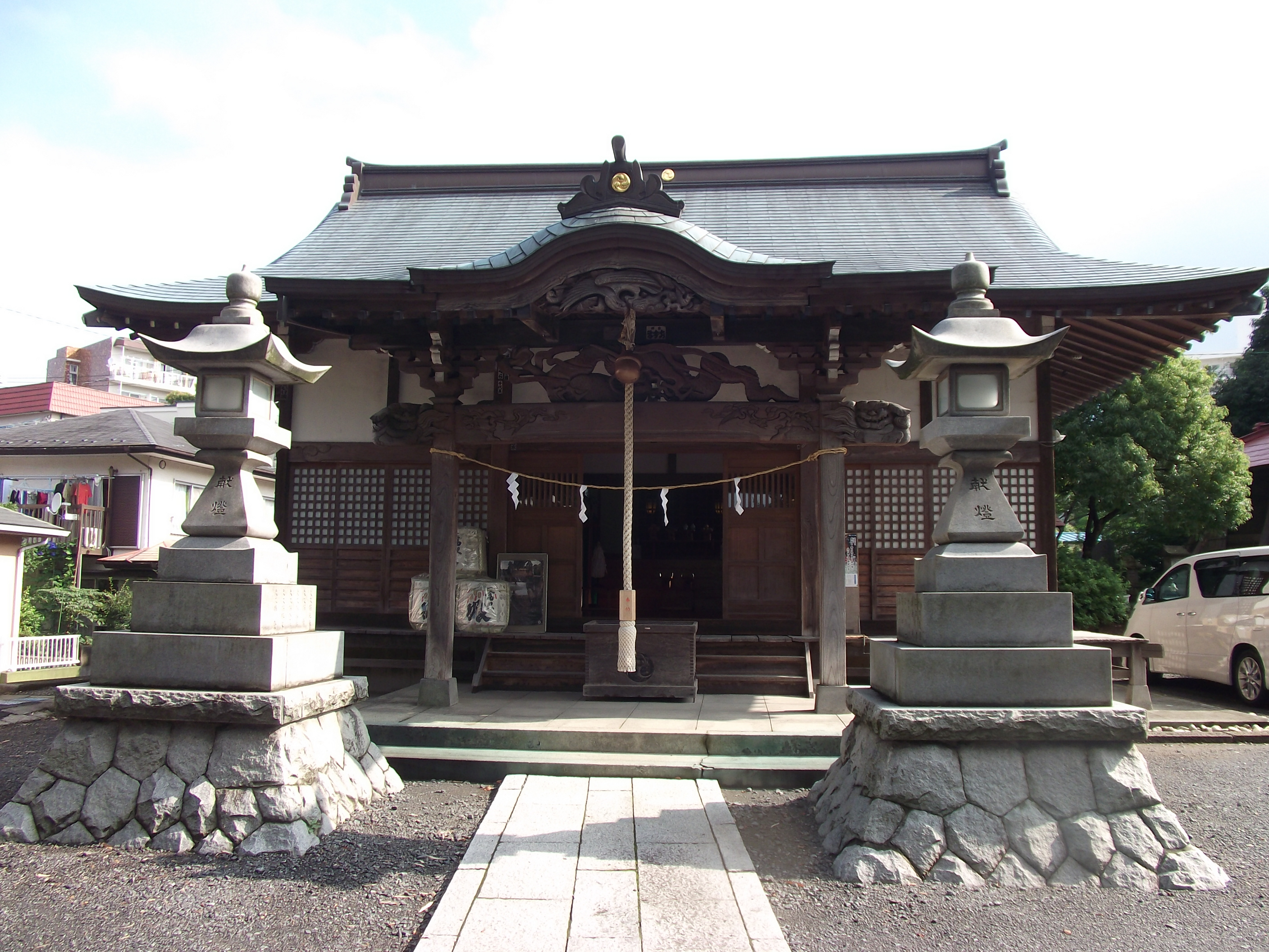 土橋神社（神奈川県川崎市宮前区）、2011年8月5日撮影。